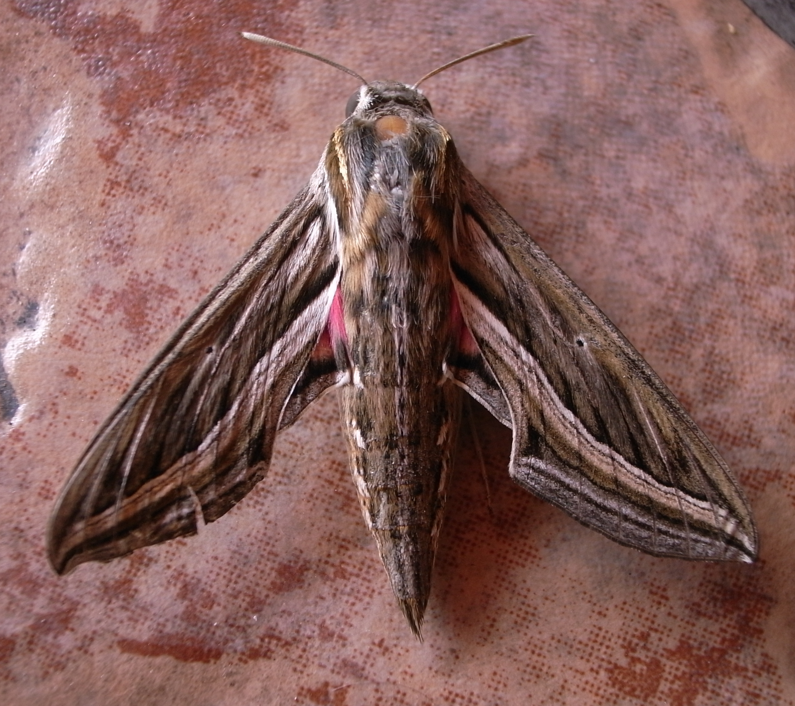 Hippotion celerio, Balluta Bay, Malta